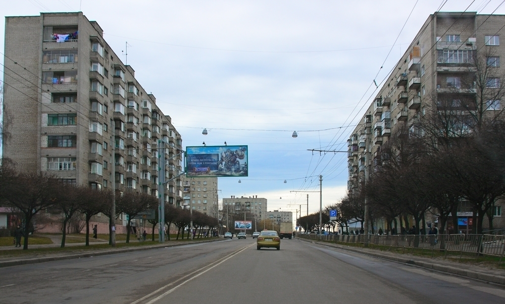 Улица Любинская во Львове